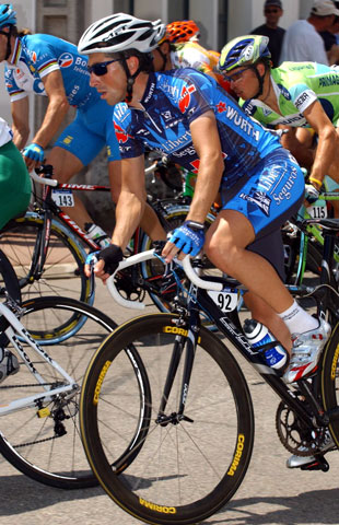 Afbeelding van Joseba Beloki.